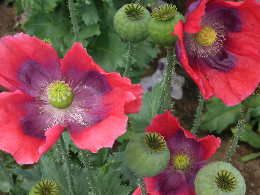 Graumohn (Papaver somniferum), Österreich